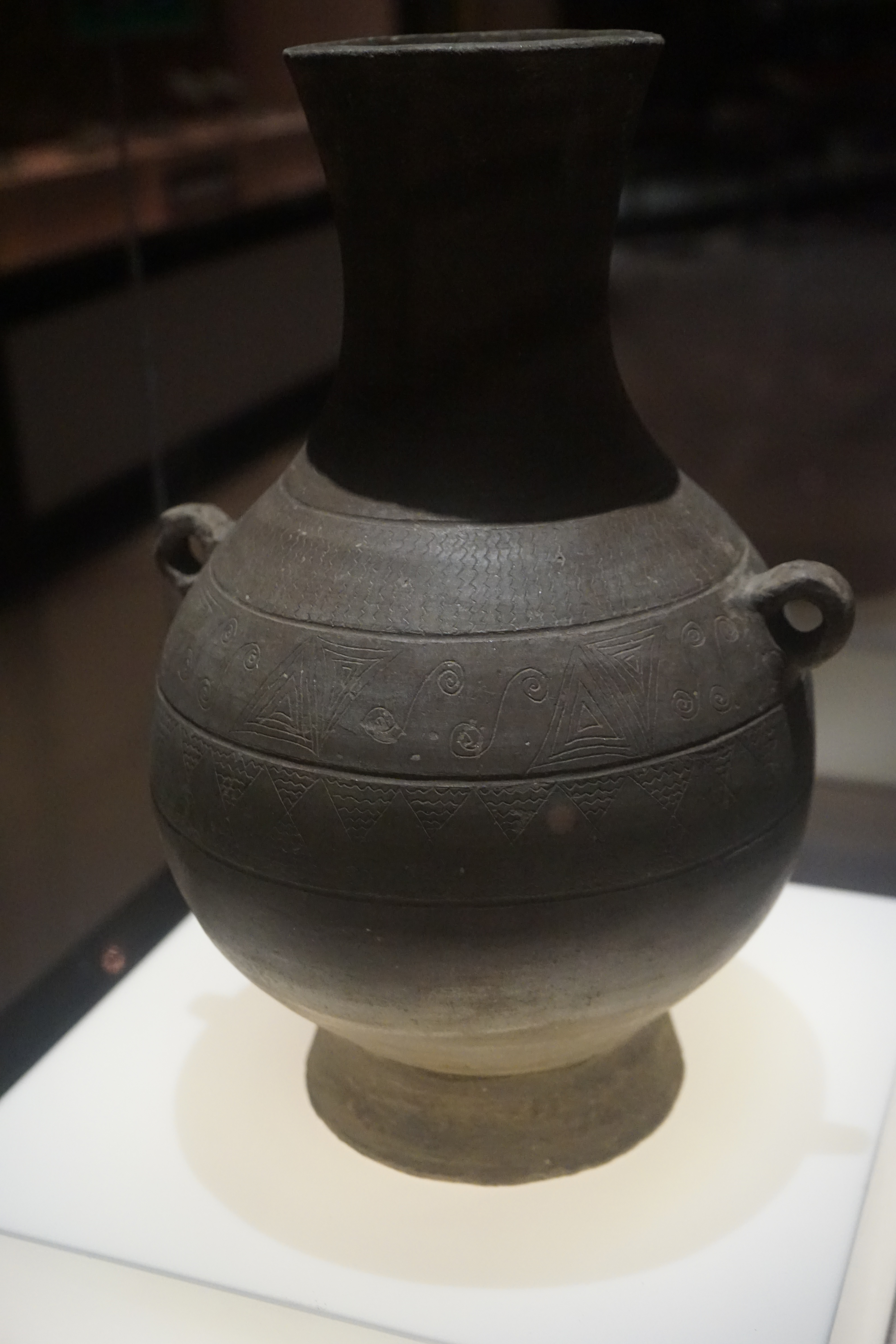 中文（中国大陆）: 波浪纹双耳陶罐。汉。三级文物